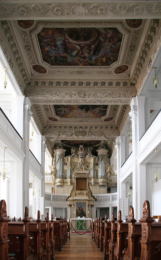 Schlosskirche, Schloss Friedenstein, Gotha, Thüringen